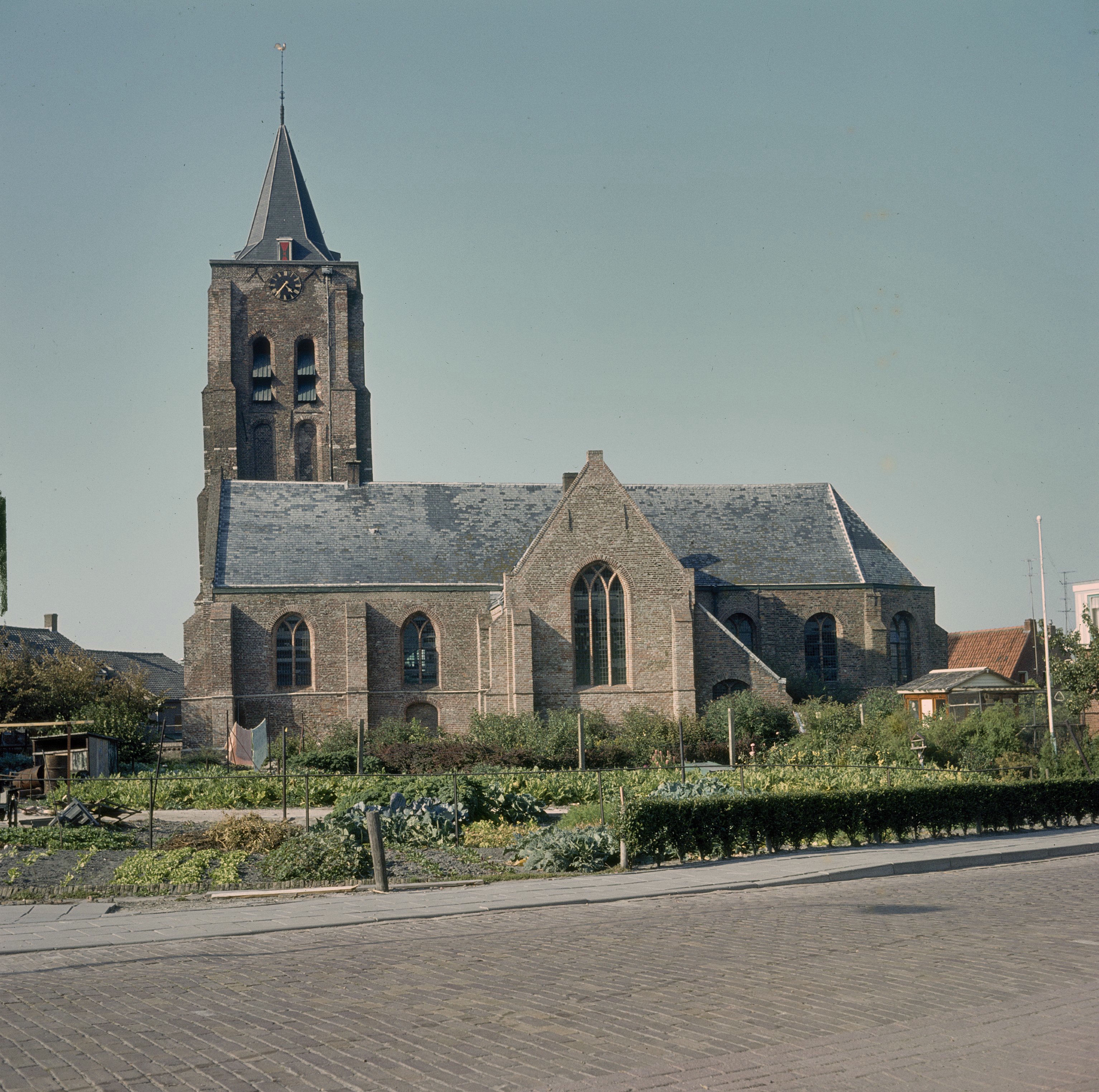 Nederlands Hervormde Kerk: Overzicht met de terzijde geplaatste kerktoren